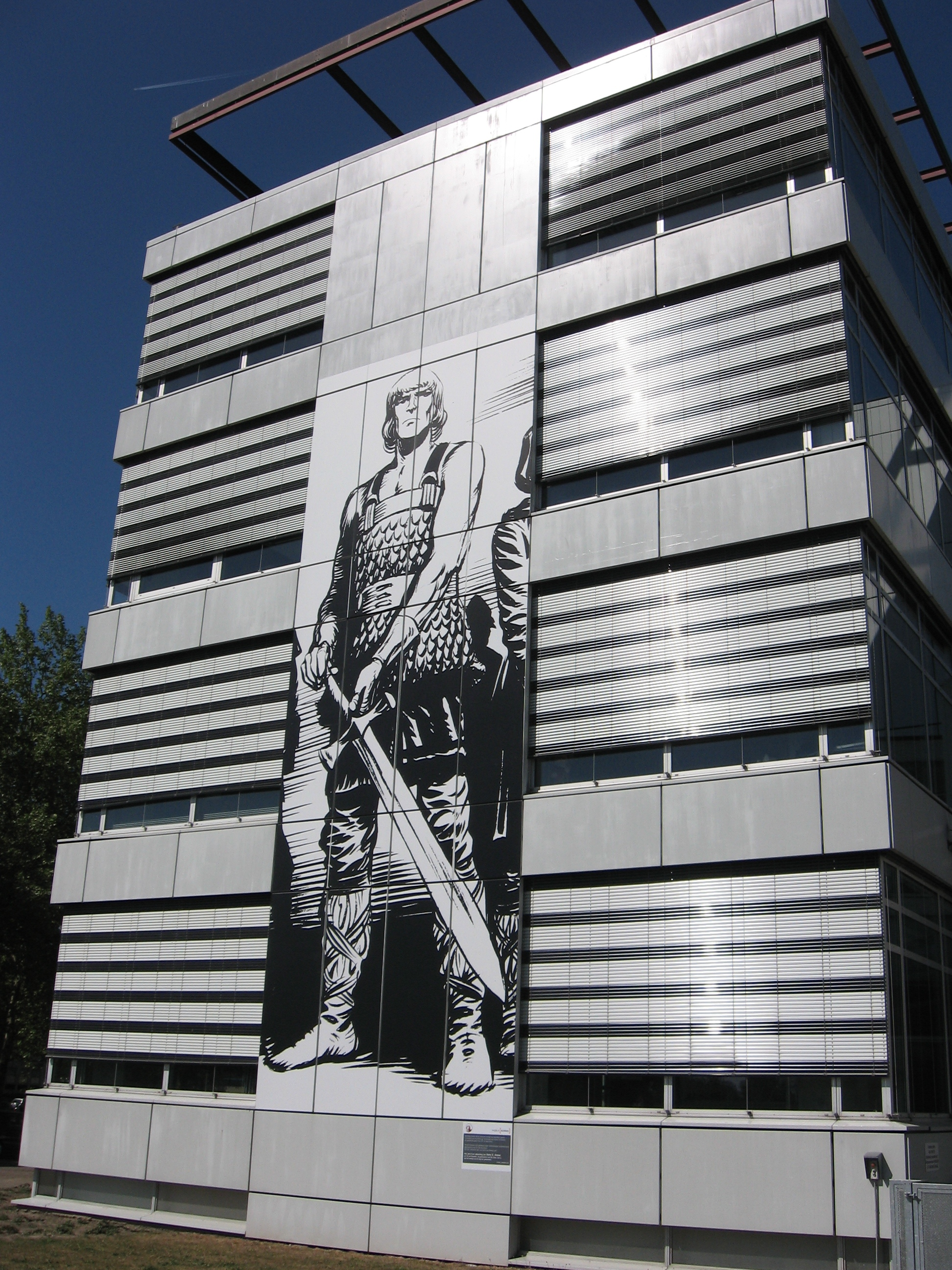 Erik de Noorman, op een gebouw in Arnhem: Op ruim twintig panden komen metershoge doeken te hangen van de stripheld. Het geesteskind van Hans G. Kresse bestaat dit jaar zestig jaar. Voldoende reden voor een eerbetoon.